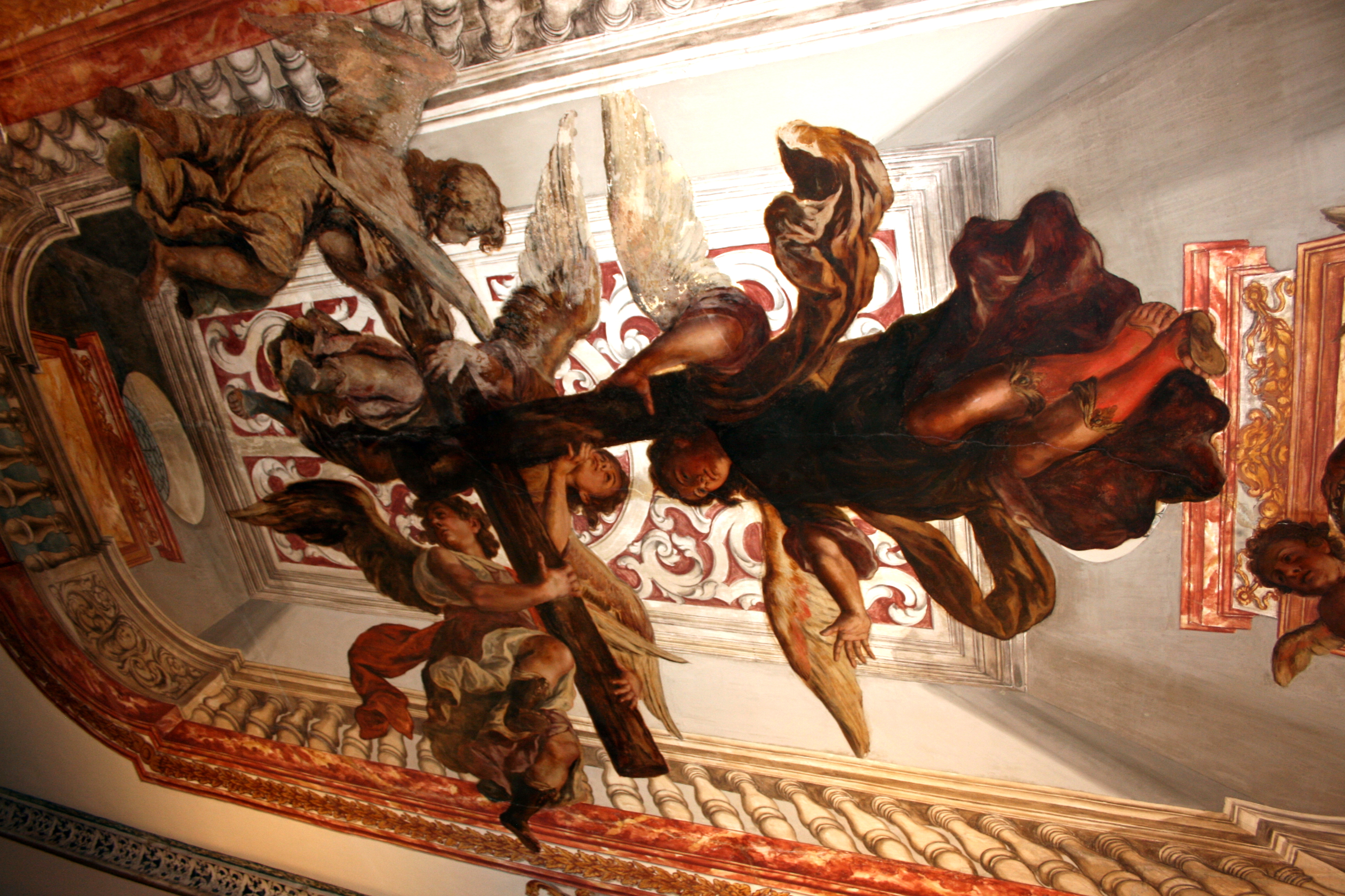 Bóveda de la sacristía de la iglesia del Hospital de los Venerables, Sevilla